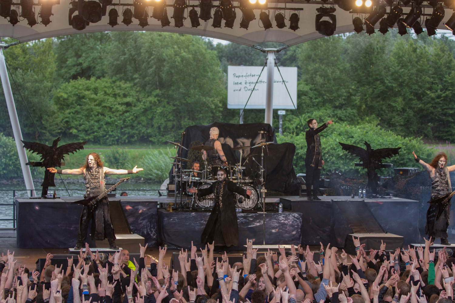 Sabaton Open Air Powerwolf Sänger